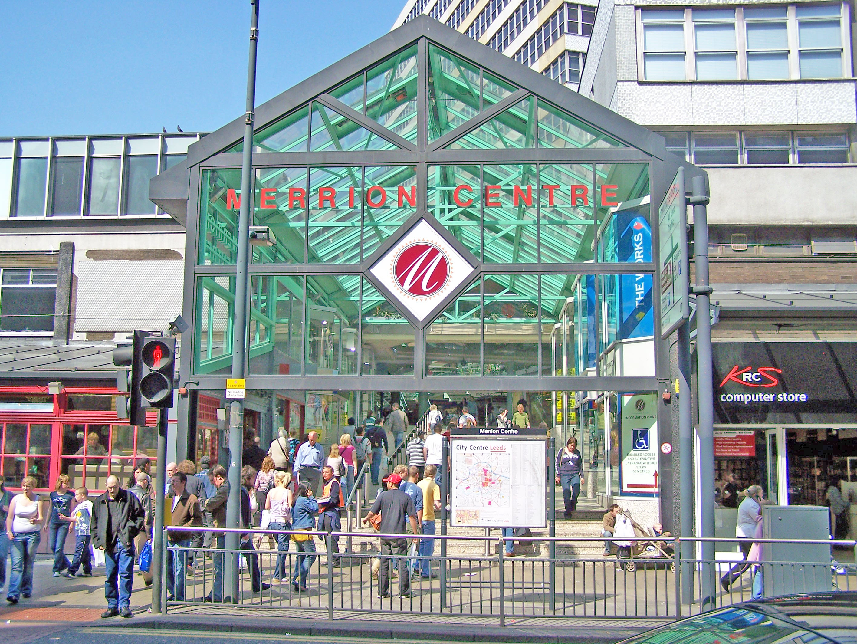 Merrion Centre, Leeds